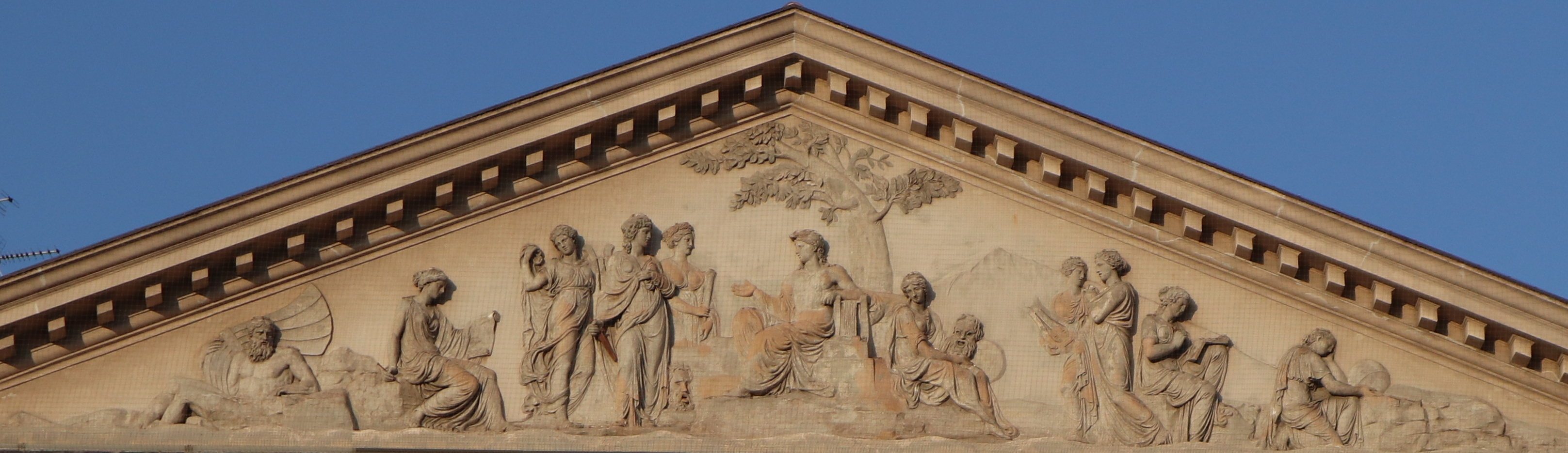 frontone del Teatro delle Muse (Ancona), in cui sono visibili tutte le sculture